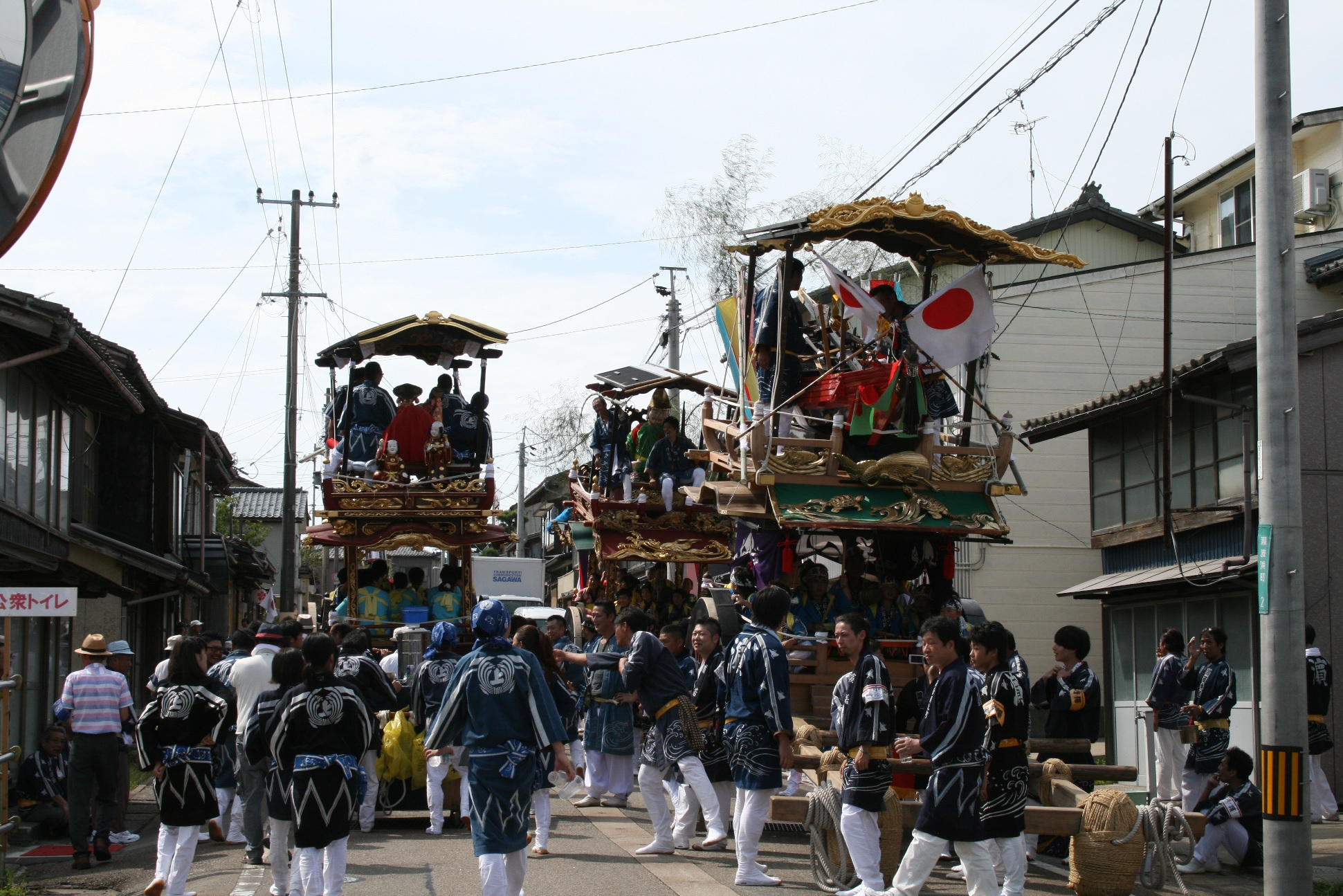 おしゃぎり